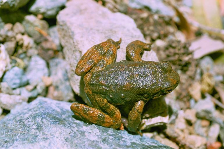 Rana boylii